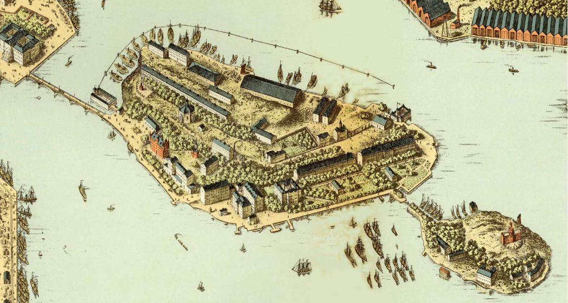 Skeppsholmen och Kastellholmen som de avbildats på en målning av Heinrich Neuhaus omkring 1870.